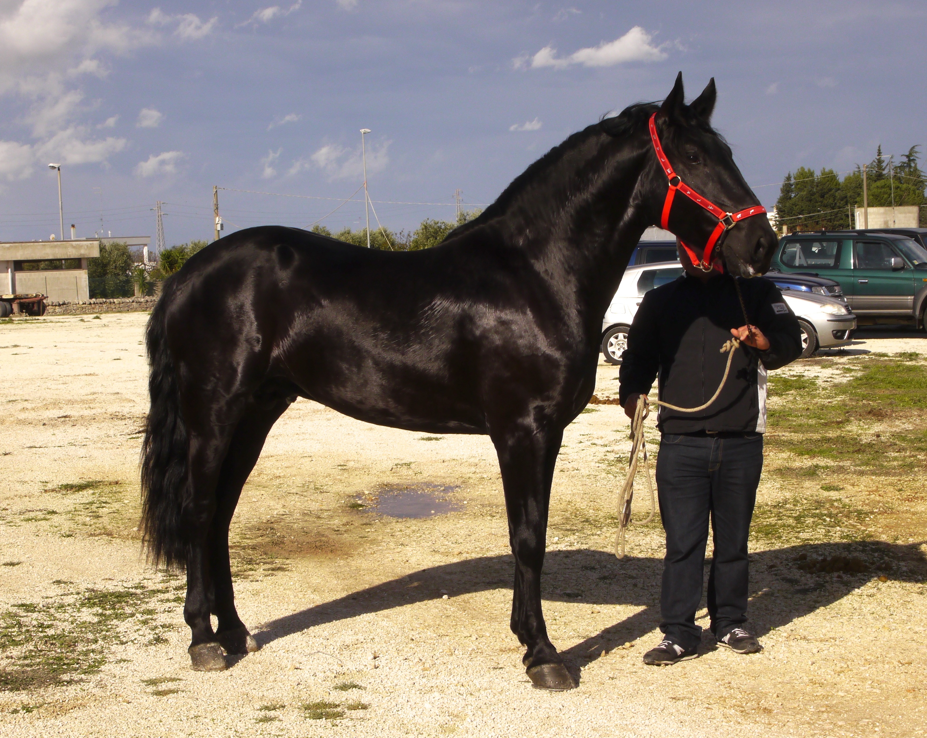 2.5 Jähriger Murgese-Hengst Donato